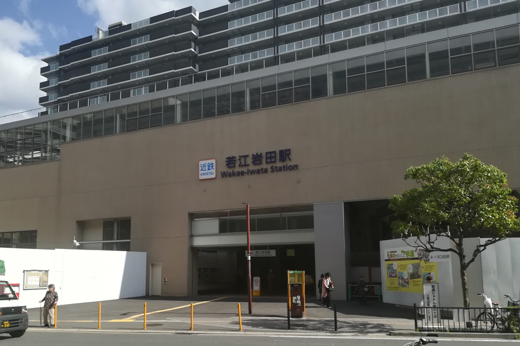 2018/05撮影、駅舎は工事中のため一部フェンスで覆われている。北側出入口を撮影。